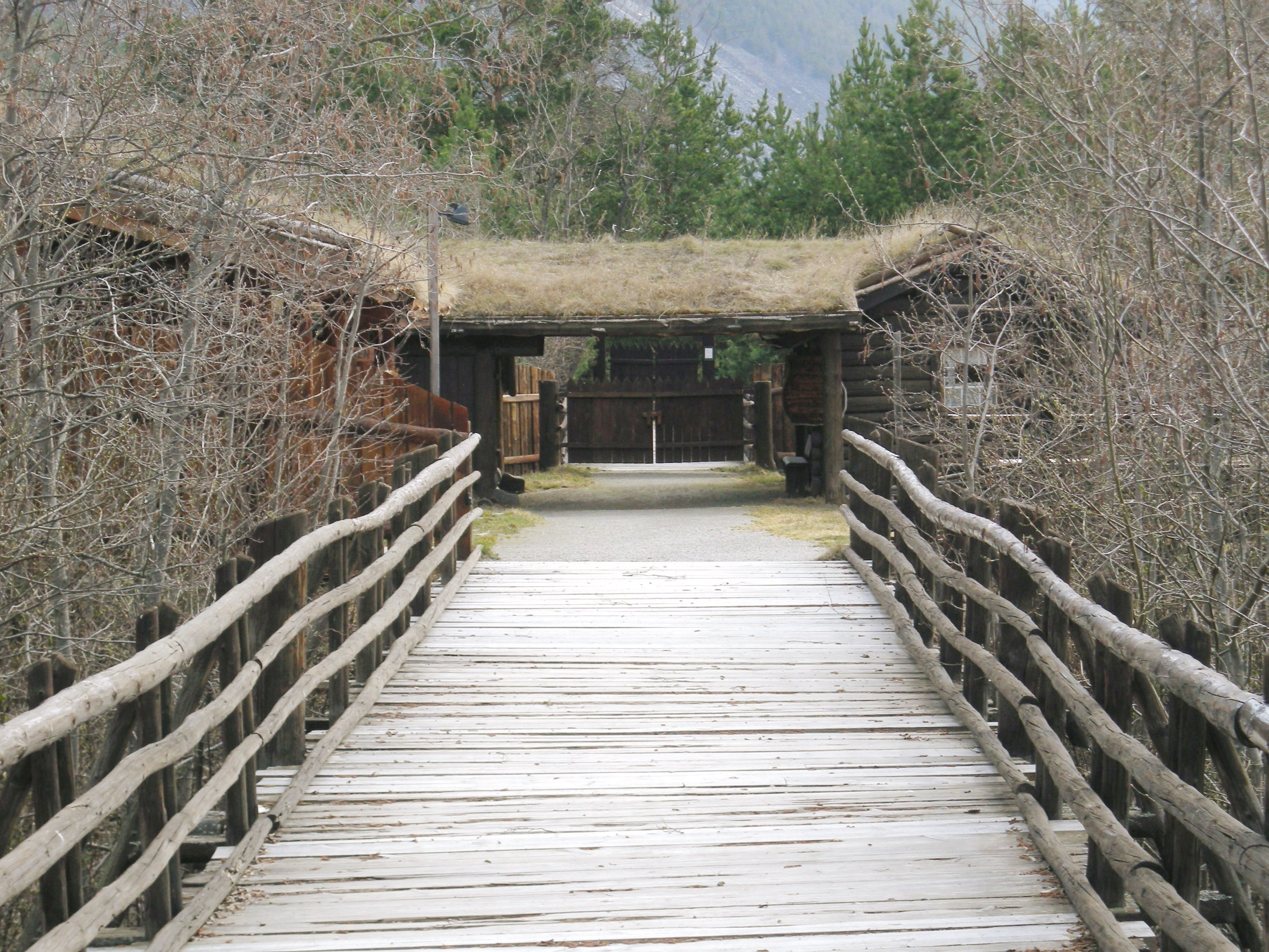 Jørundgard Middelaldersenter på Nord-Sel